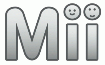 Mii Simbol